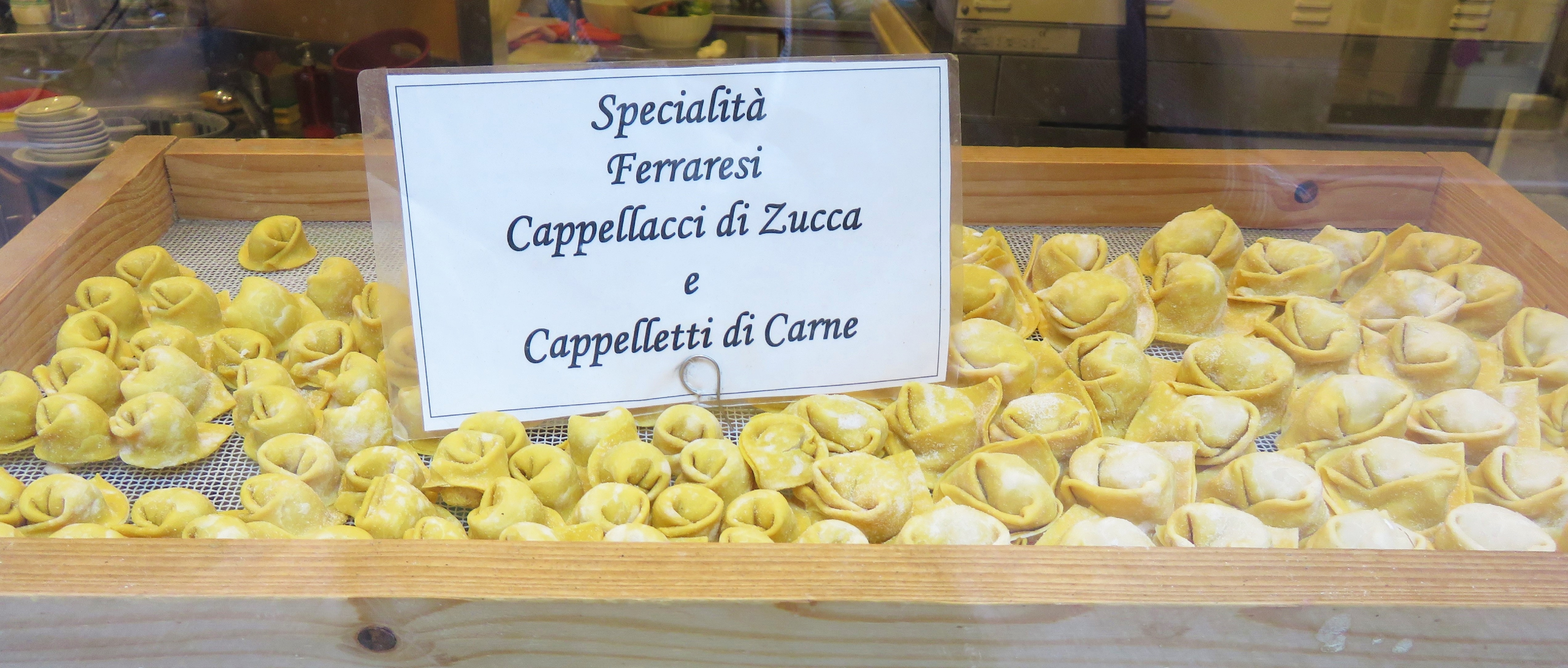 pasta ripiena tipica tradizionale ferrarese